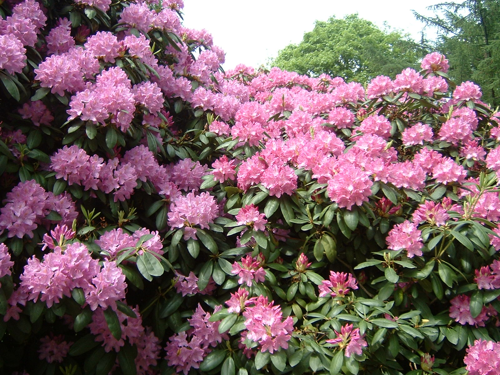 Bildbeschreibung: Rhododendron in voller Blüte Quelle: selbst gemacht Fotograf/Zeichner: Harald Köster, Bochum Datum: "created May 2003